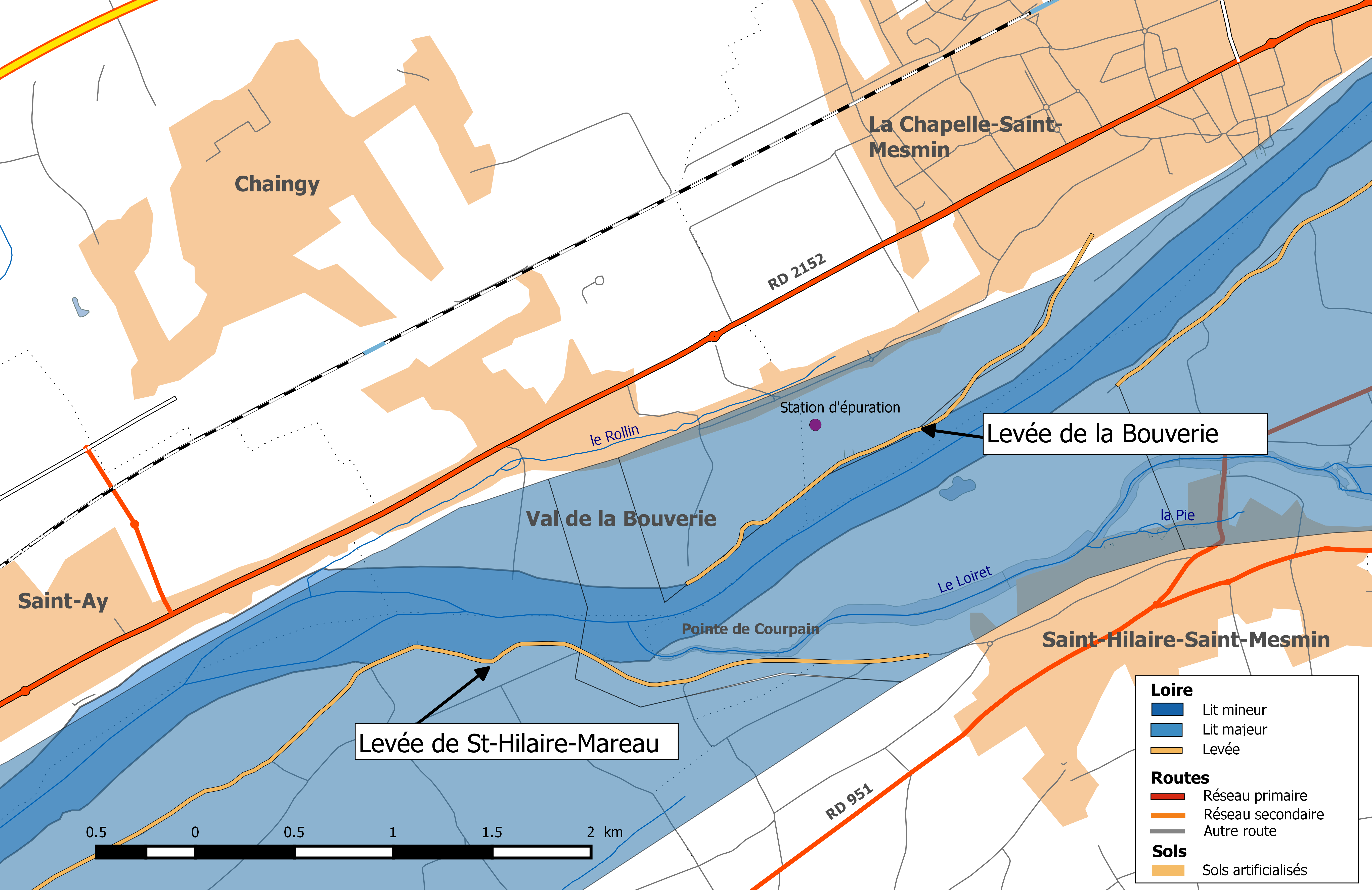 Système d'endiguement de la Loire dans le département du Loiret. Val de la Bouverie